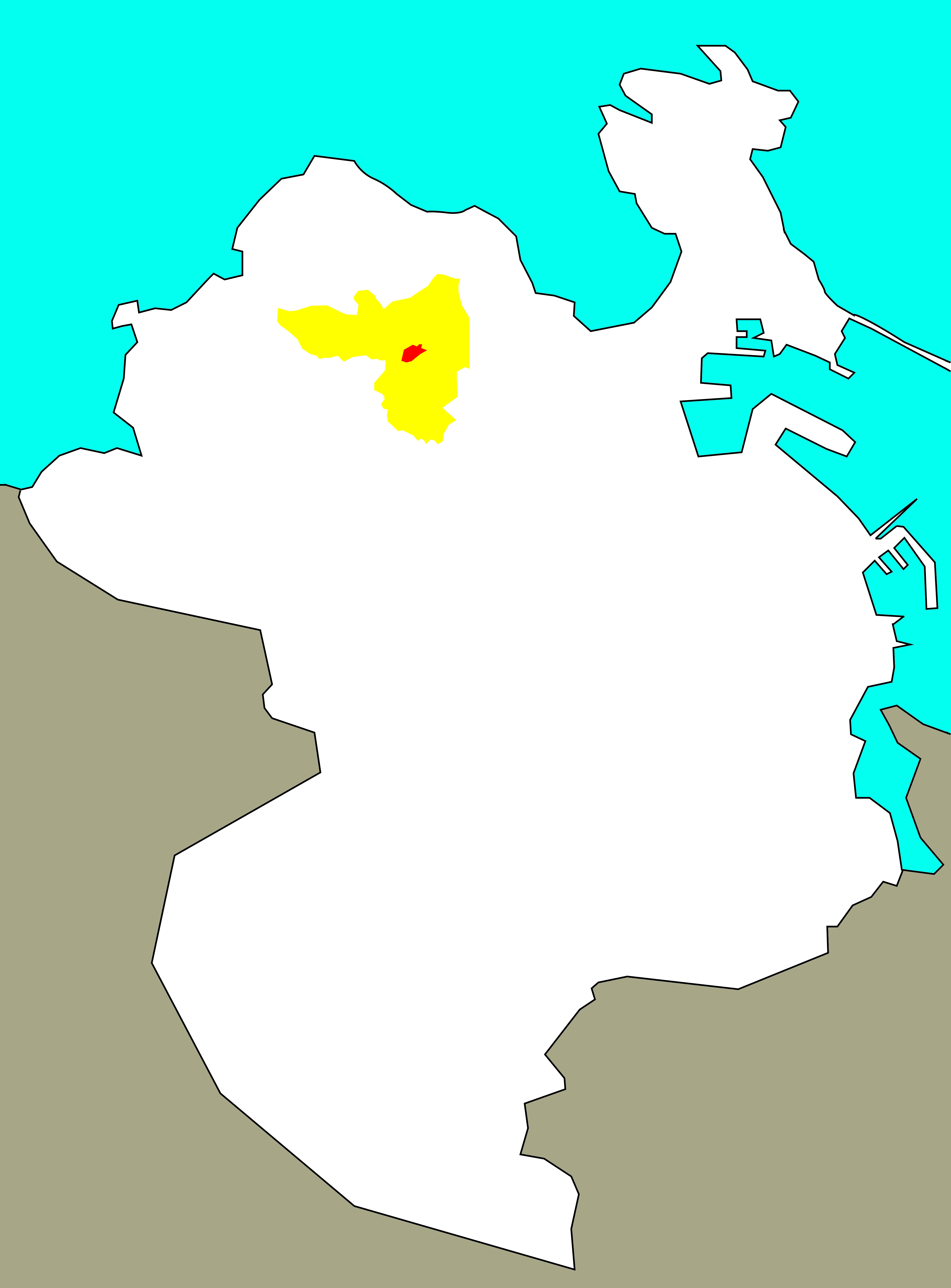 Situación do Coidal no "barrio-territorio" de San Pedro de Visma.[1]